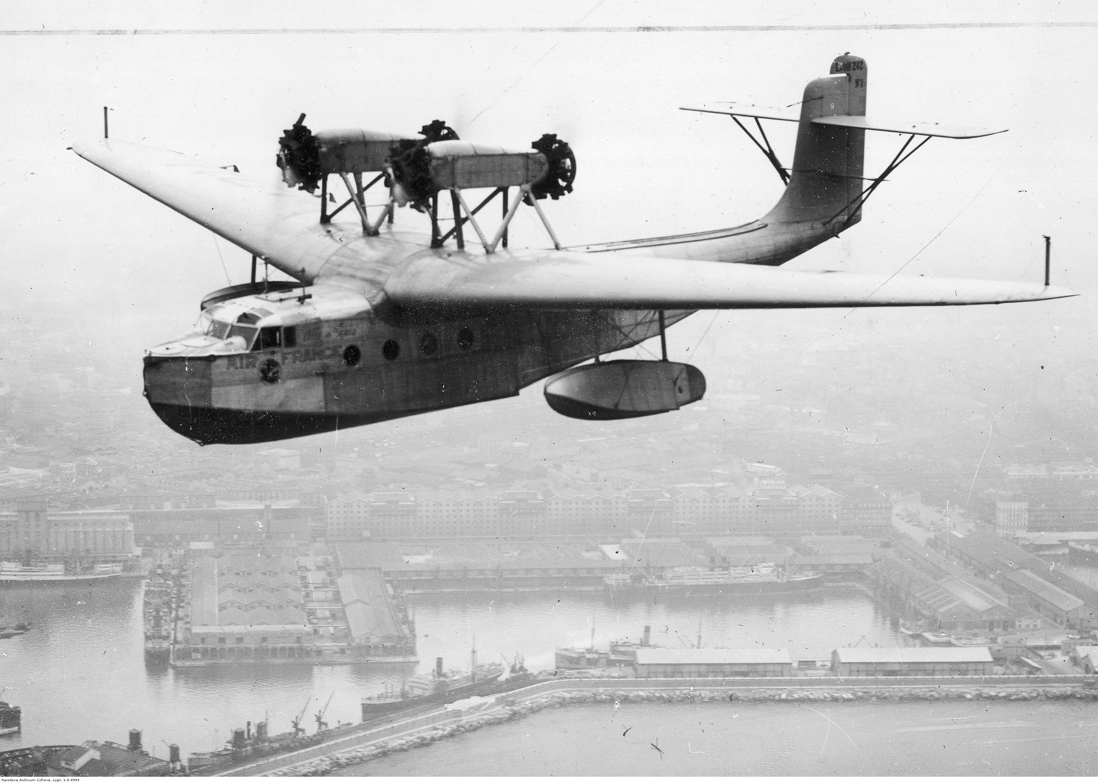 Samolot Liore et Olivier 242 należący do francuskich linii lotniczych Air France latający na trasie Ateny-Bejrut.